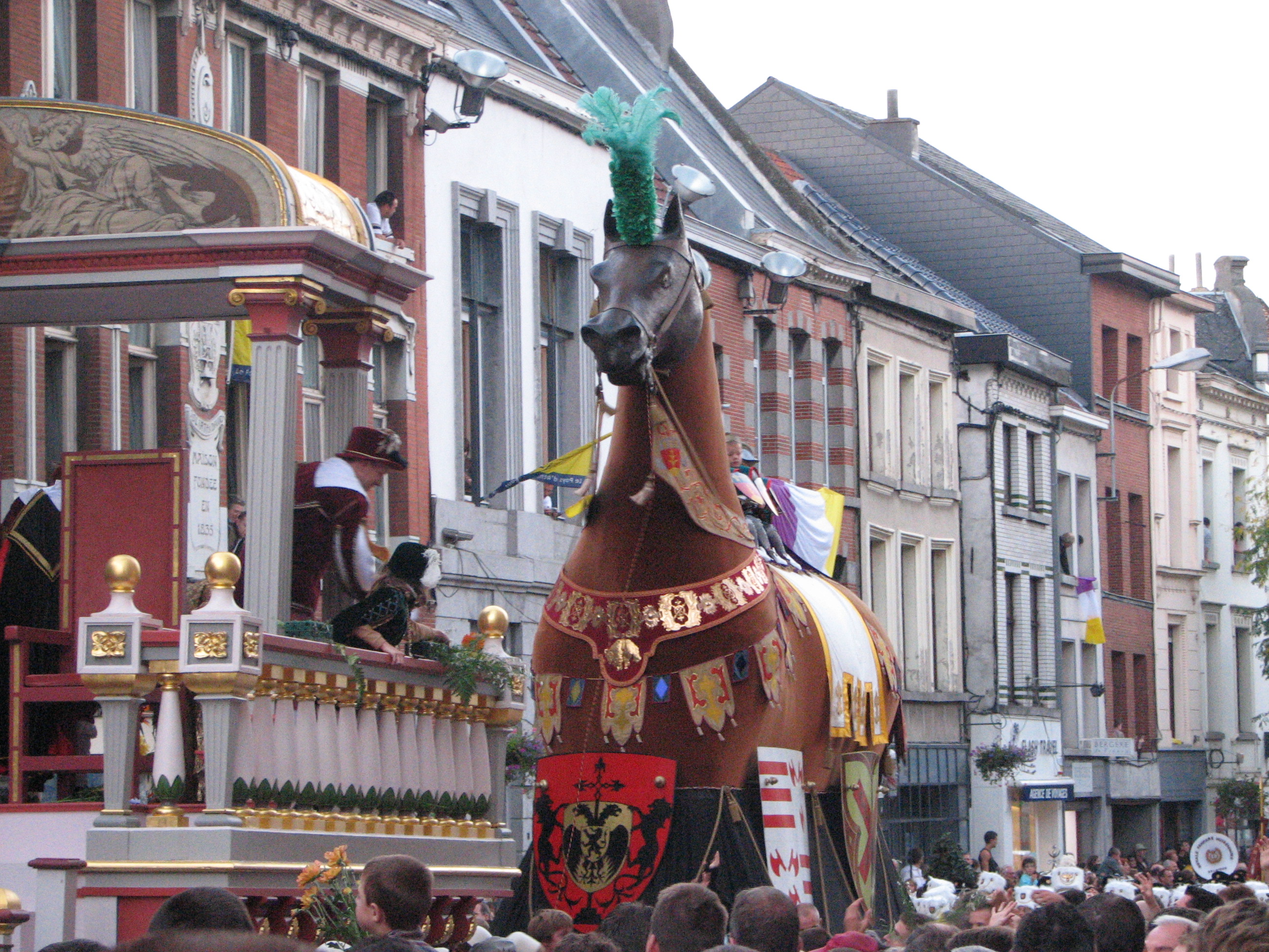 Le cheval Bayard en fin de cortège